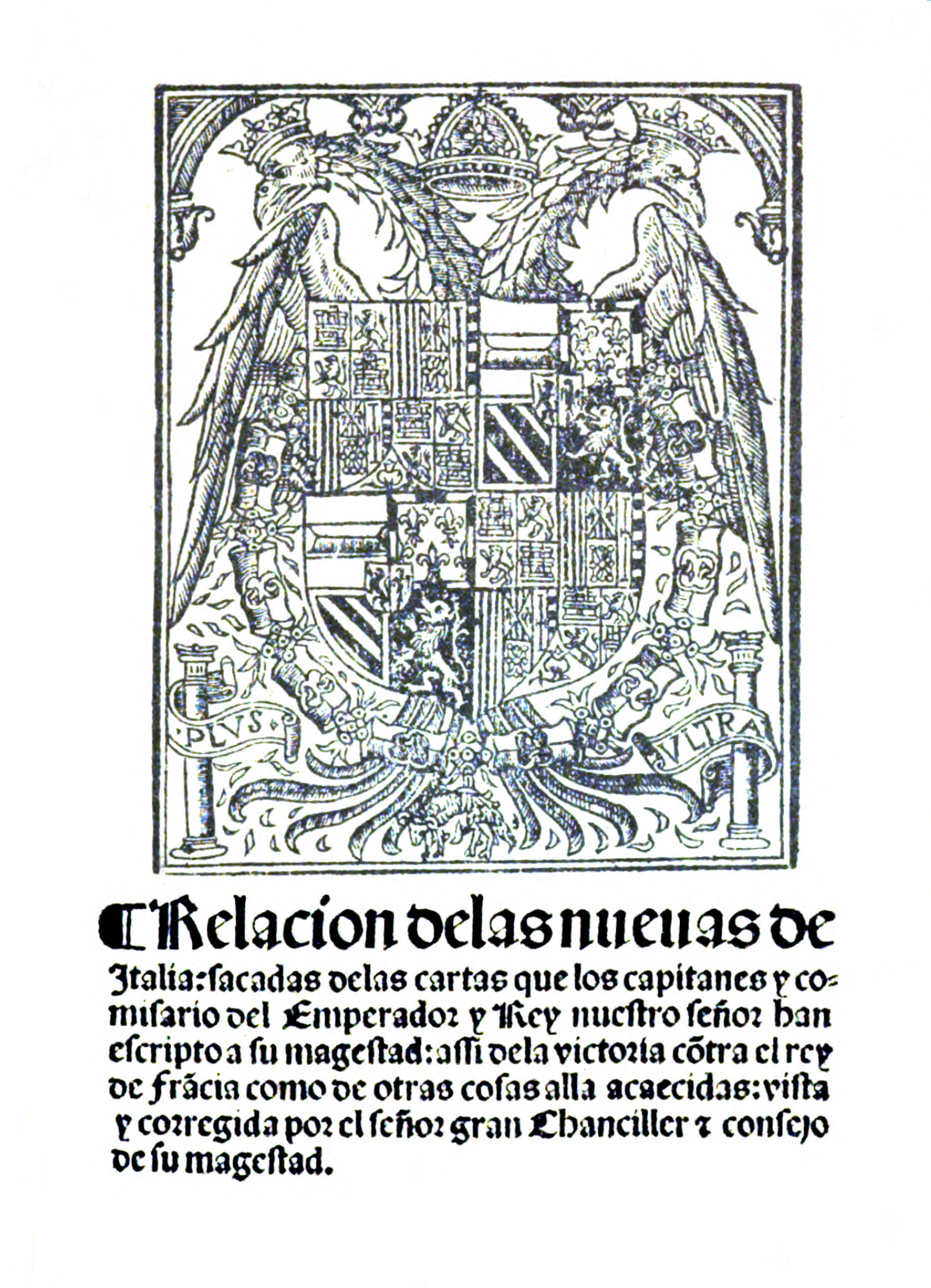 Primera página de "Relación de las nuevas de Italia" de Alonso de Valdés. Impreso en Alcalá de Henares por Miguel de Eguía en 1525.